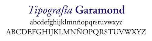 Muestra de la Tipografía Garamond